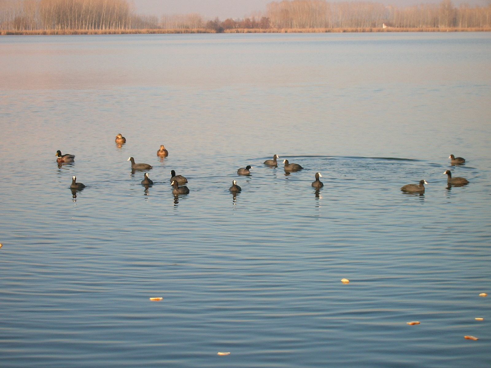 Tobia Simona, foto personale. Fotografia Folaghe sul Lago di Candia. Candia Marzo 2007.